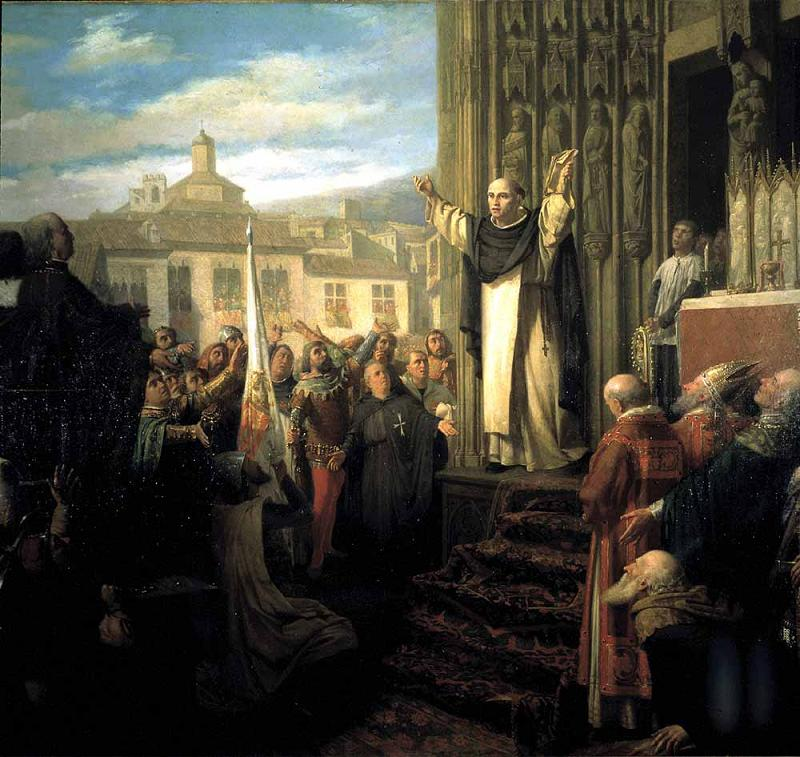 El lienzo representa el Compromiso de Caspe, que tuvo lugar en 1412 y en el que se acordó que el infante Fernando de Castilla ocuparía el trono aragonés.